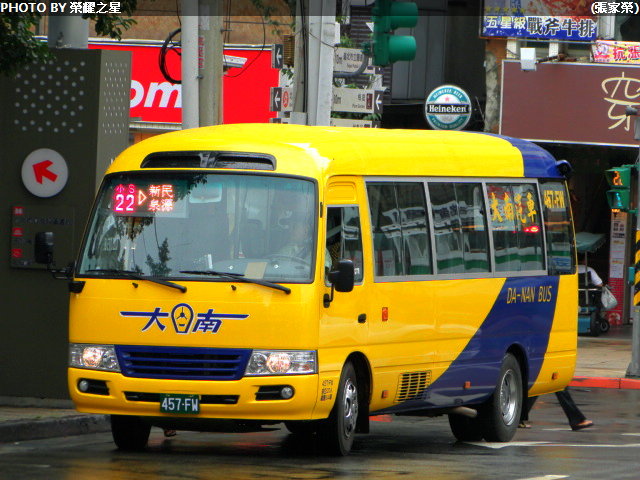 大南汽車小22路線.457-FW